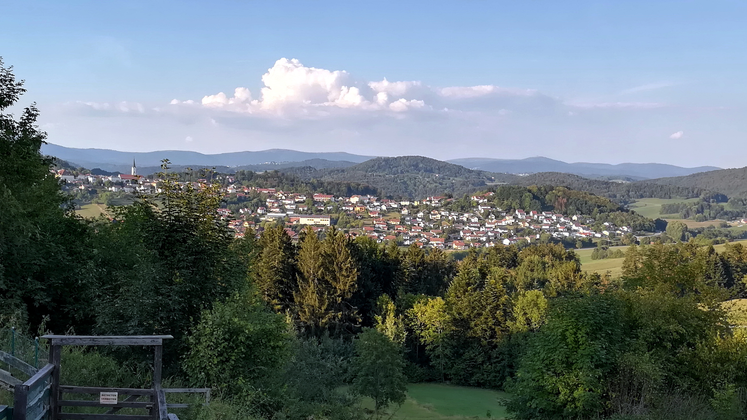 Schönberg ist ein Markt im niederbayerischen Landkreis Freyung-Grafenau, der Sitz der Verwaltungsgemeinschaft Schönberg und ein staatlich anerkannter Luftkurort.